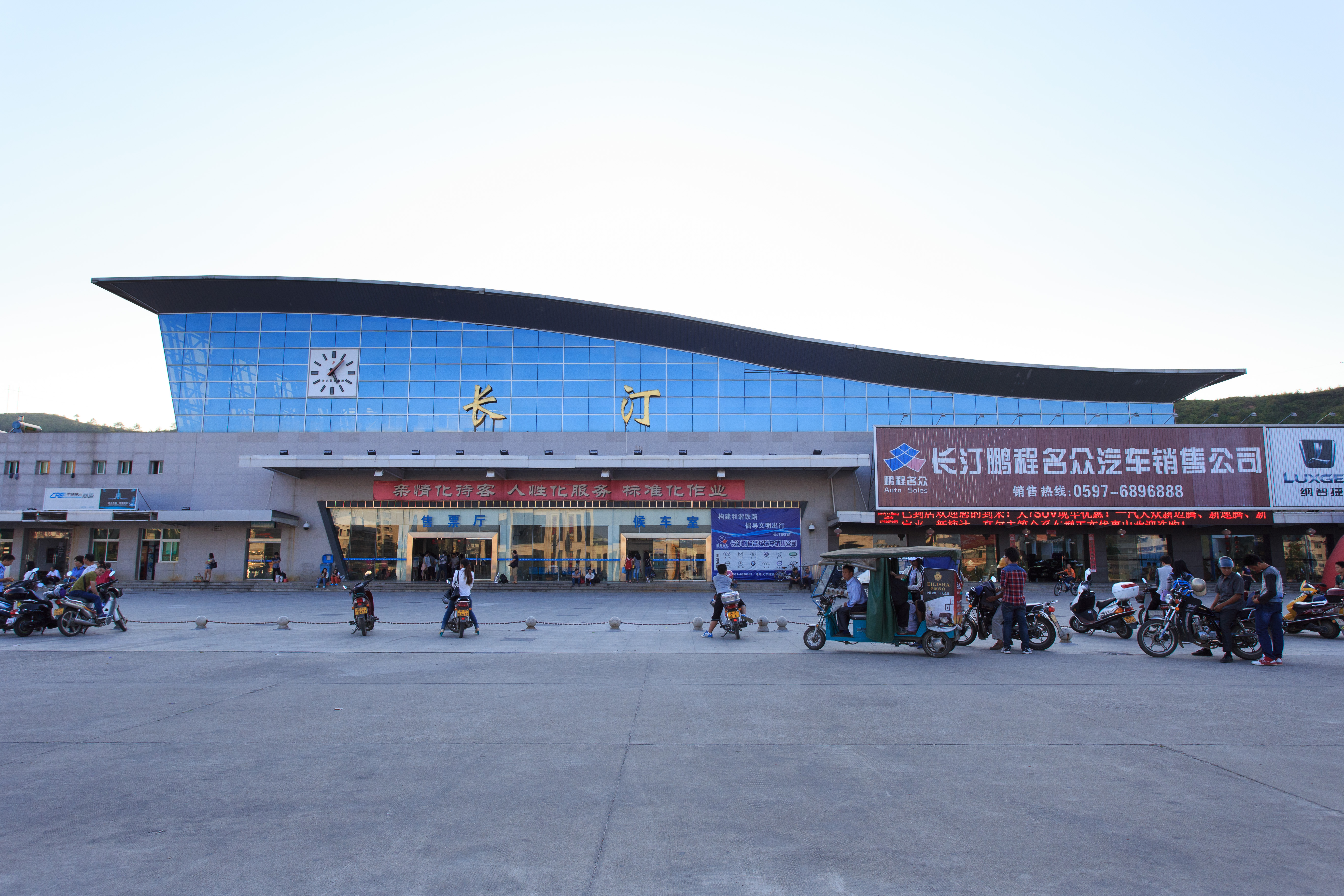 福建省长汀县火车站